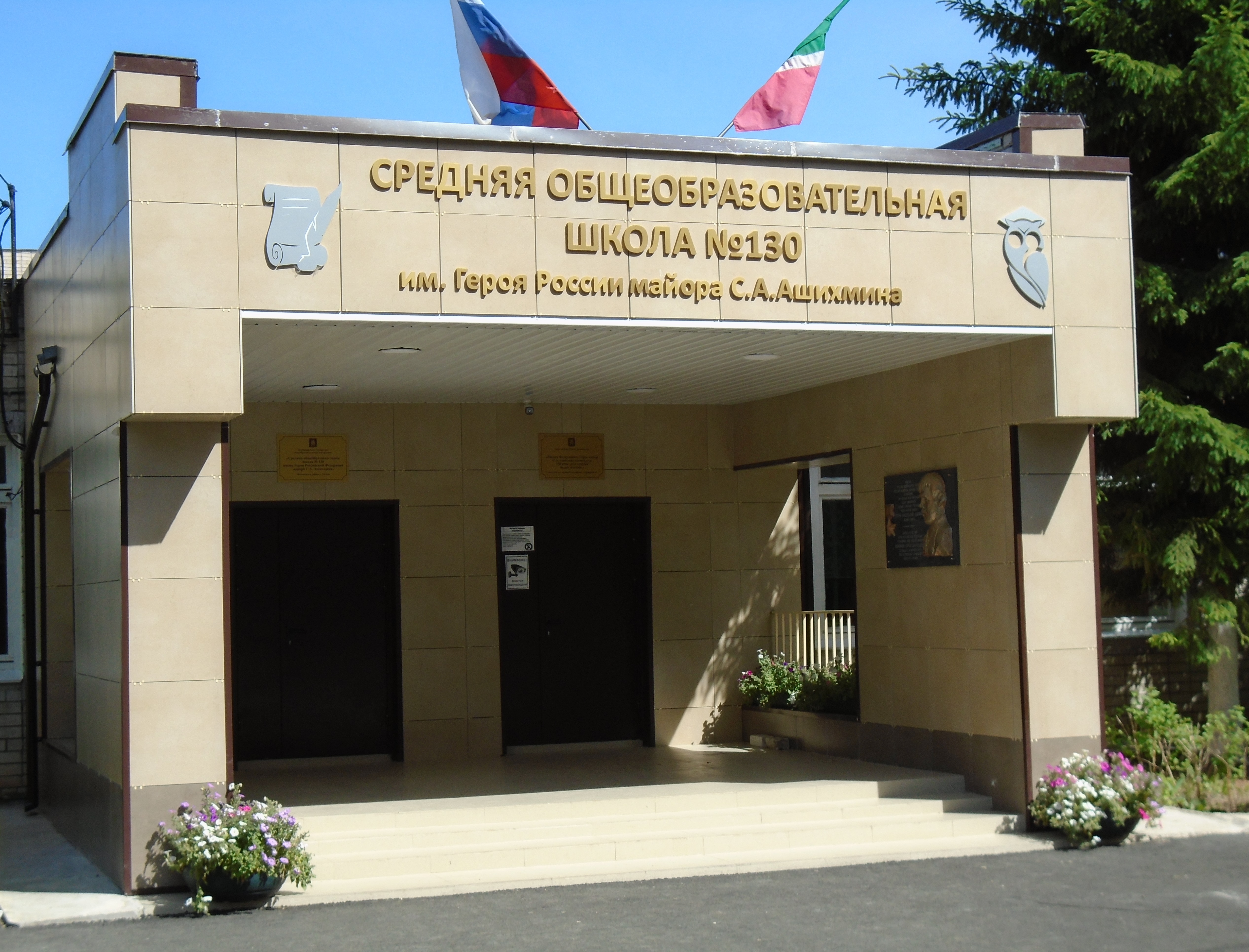 Здание Средней общеобразовательной школы № 130 им. Героя России майора С. А. Ашихмина